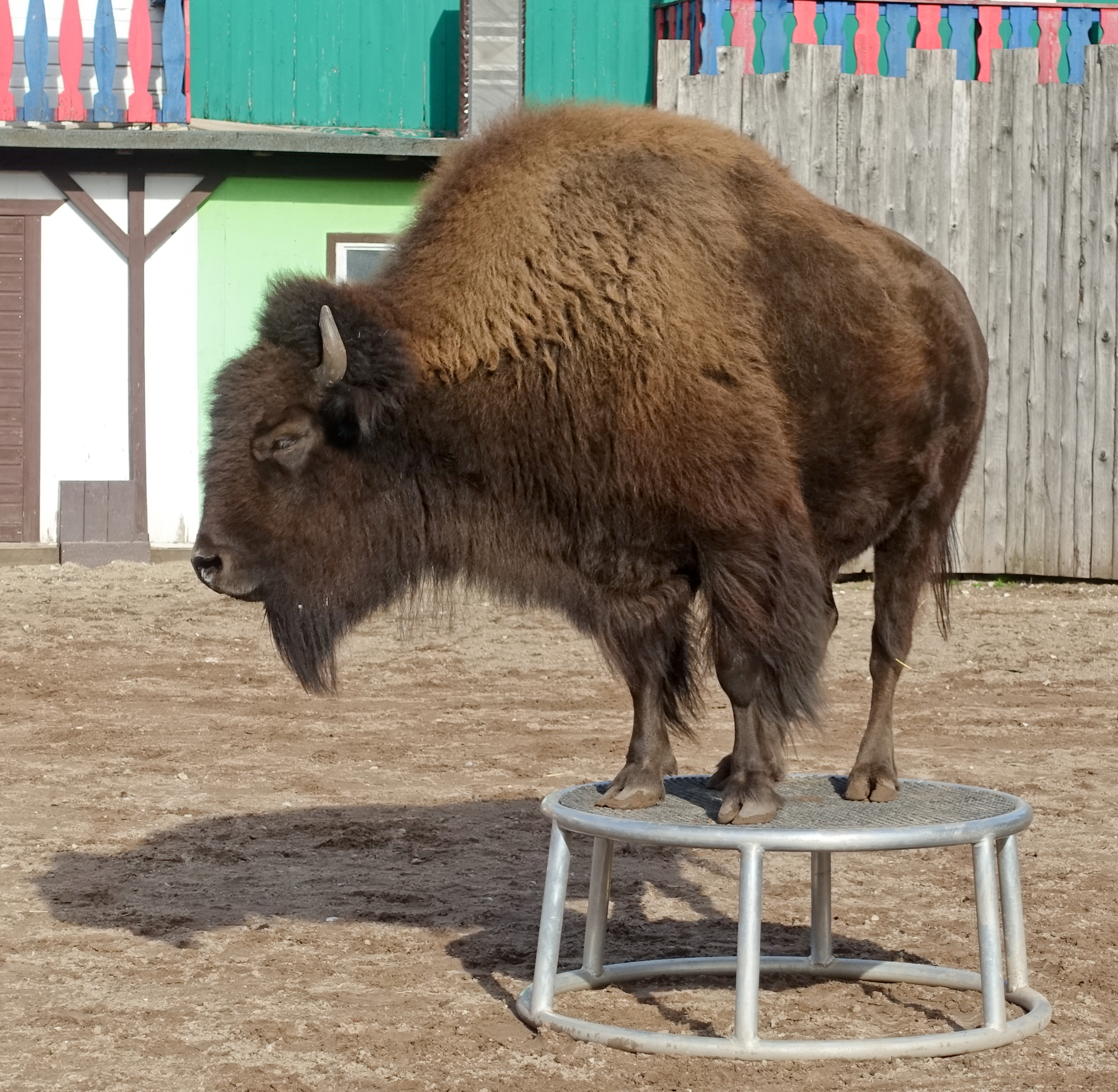 Marcel Krämer zeigt dressierte Bisons im Safariland Stukenbrock in Schloss Holte-Stukenbrock. Er ist laut SAT-1 Reportage vom 27. März 2018 weltweit einer von drei Menschen, die Bisons dressiert haben.